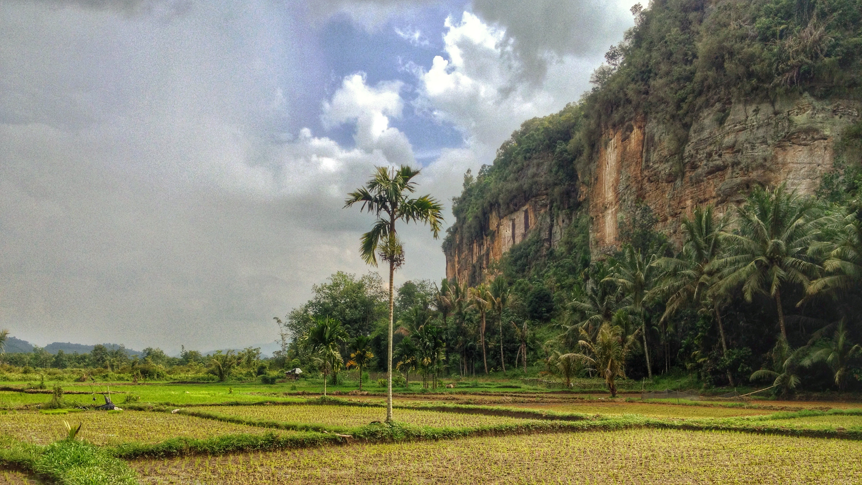 Lembah Harau Kabut